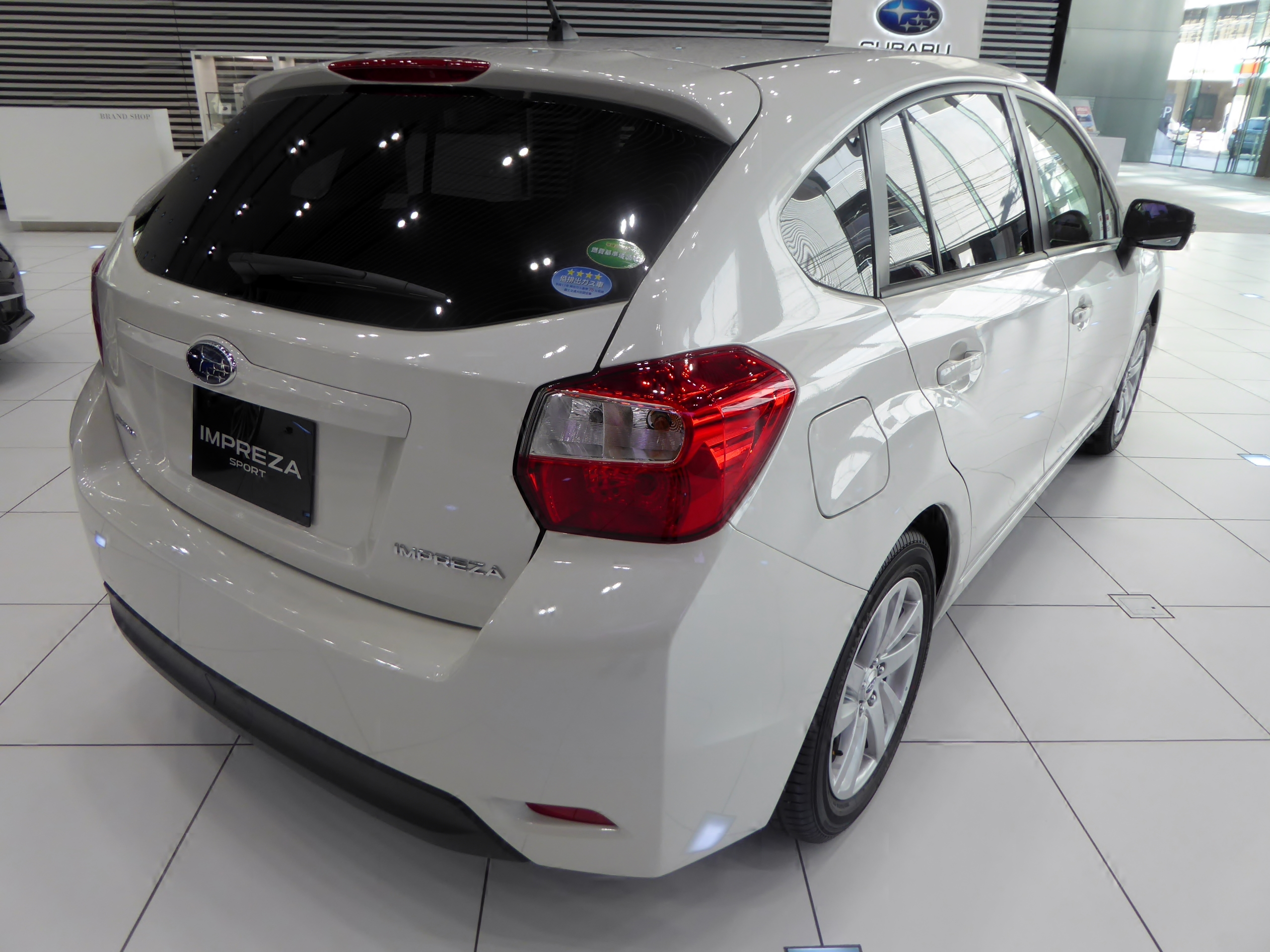 DBA-GP7型スバル・インプレッサスポーツ2.0iアイサイトをリアから撮影。